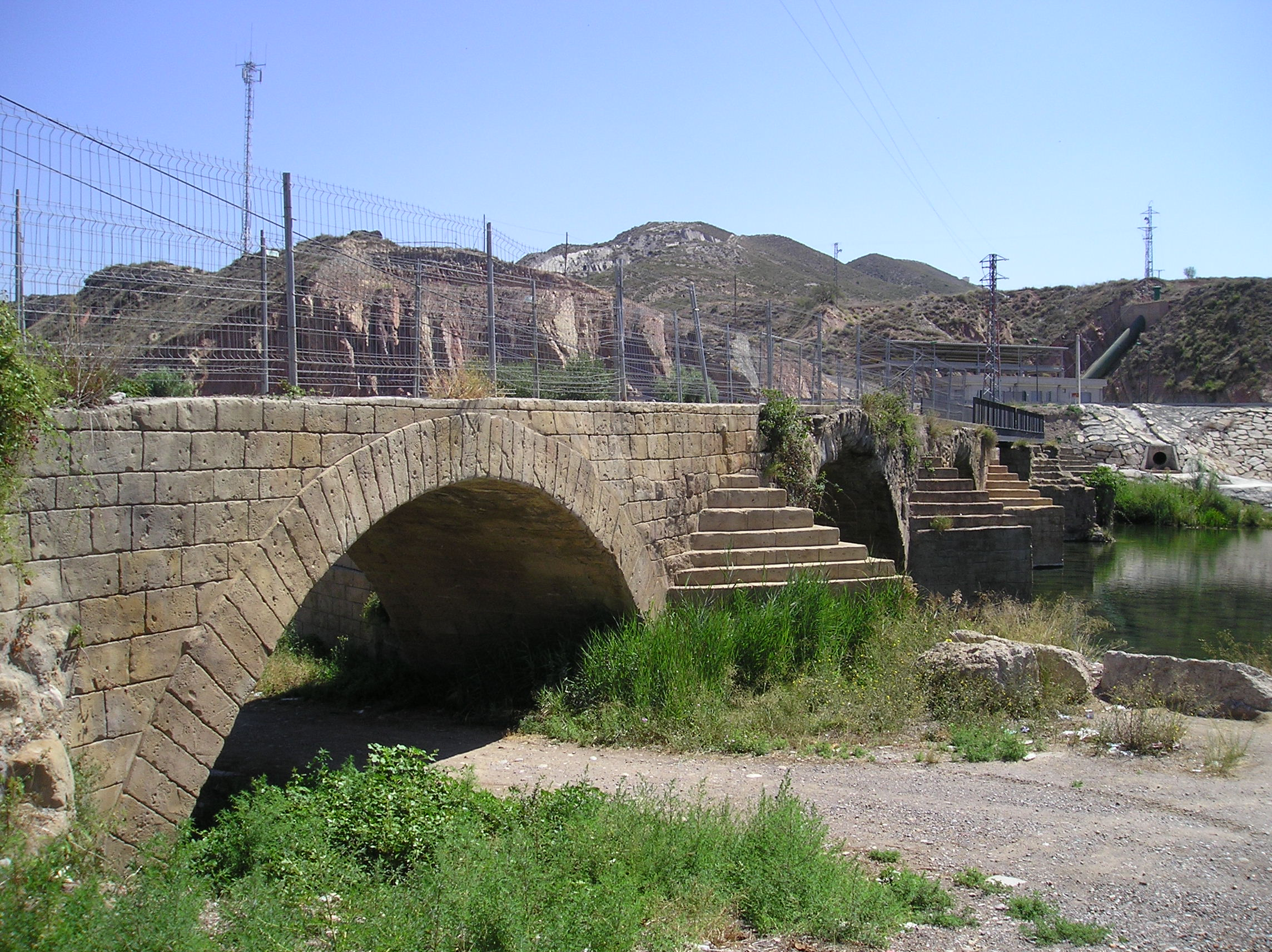 Pont Vell d'Alfarràs